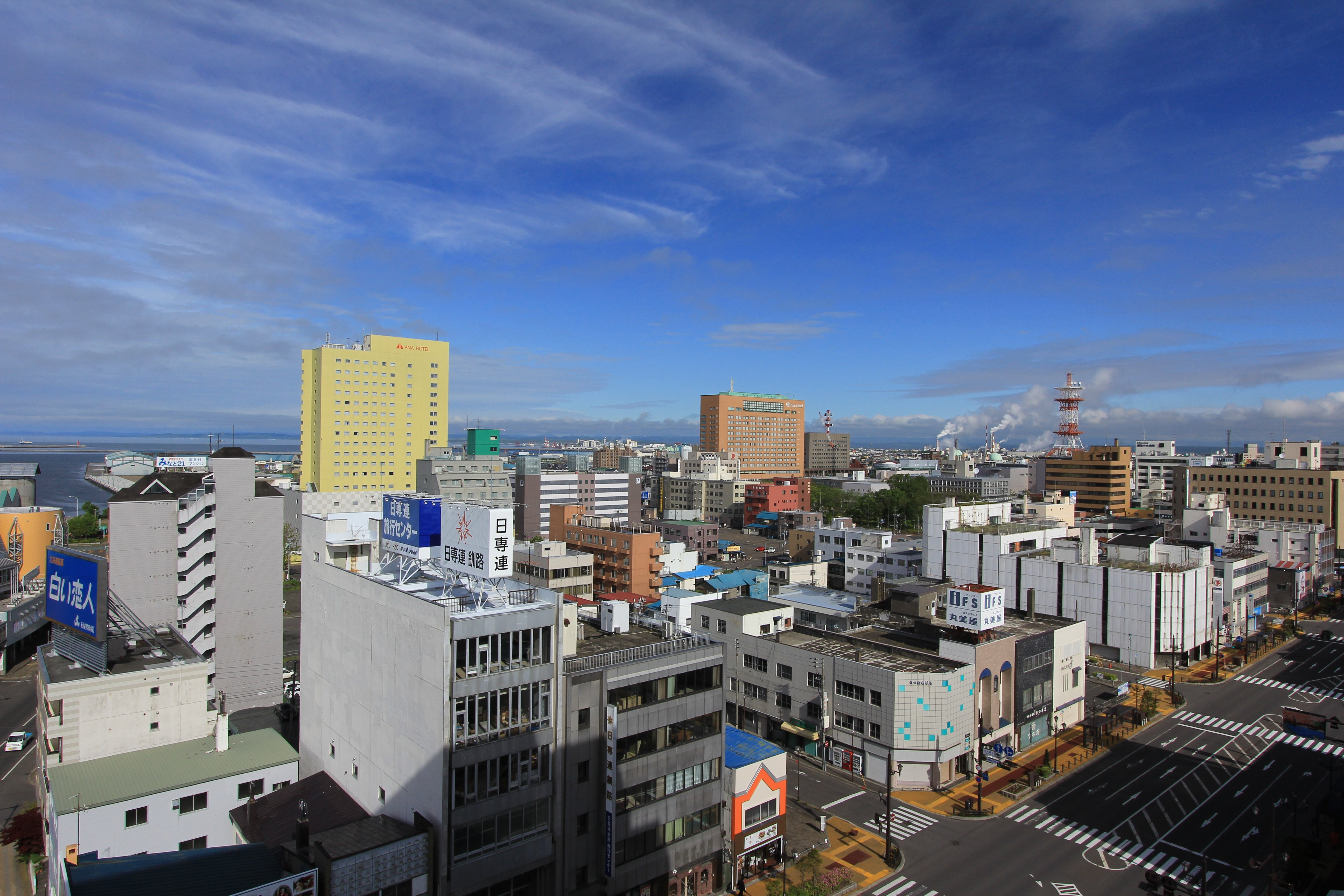 ラビスタ釧路川からの風景